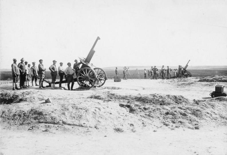 Vor Bir-es-Seba Beersheba, Palästina. Im April 1917 Deutsche Flieger-Abwehrbatterie an der Heeresstrasse vor Bir-es-Beba. Filmtrupp Orient / Bild- und Filmamt - Bildstelle - (BUFA)